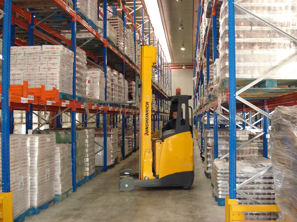 Interior de los Almacenes de Cayco